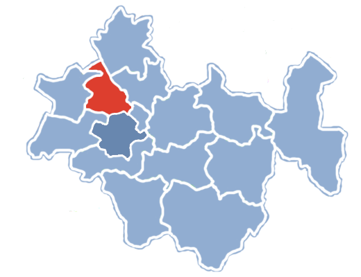 Położenie gminy Dobryszyce na terenie powiatu radomszczańskiego.